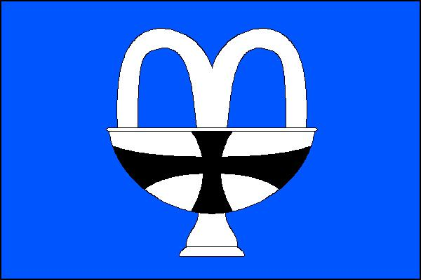 Vlajka obce Karlova Studánka